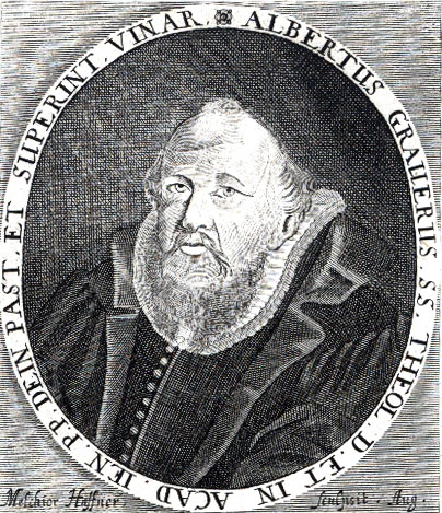 Albert Grauer (1575-1617), deutscher lutherischer Theologe. Radierung